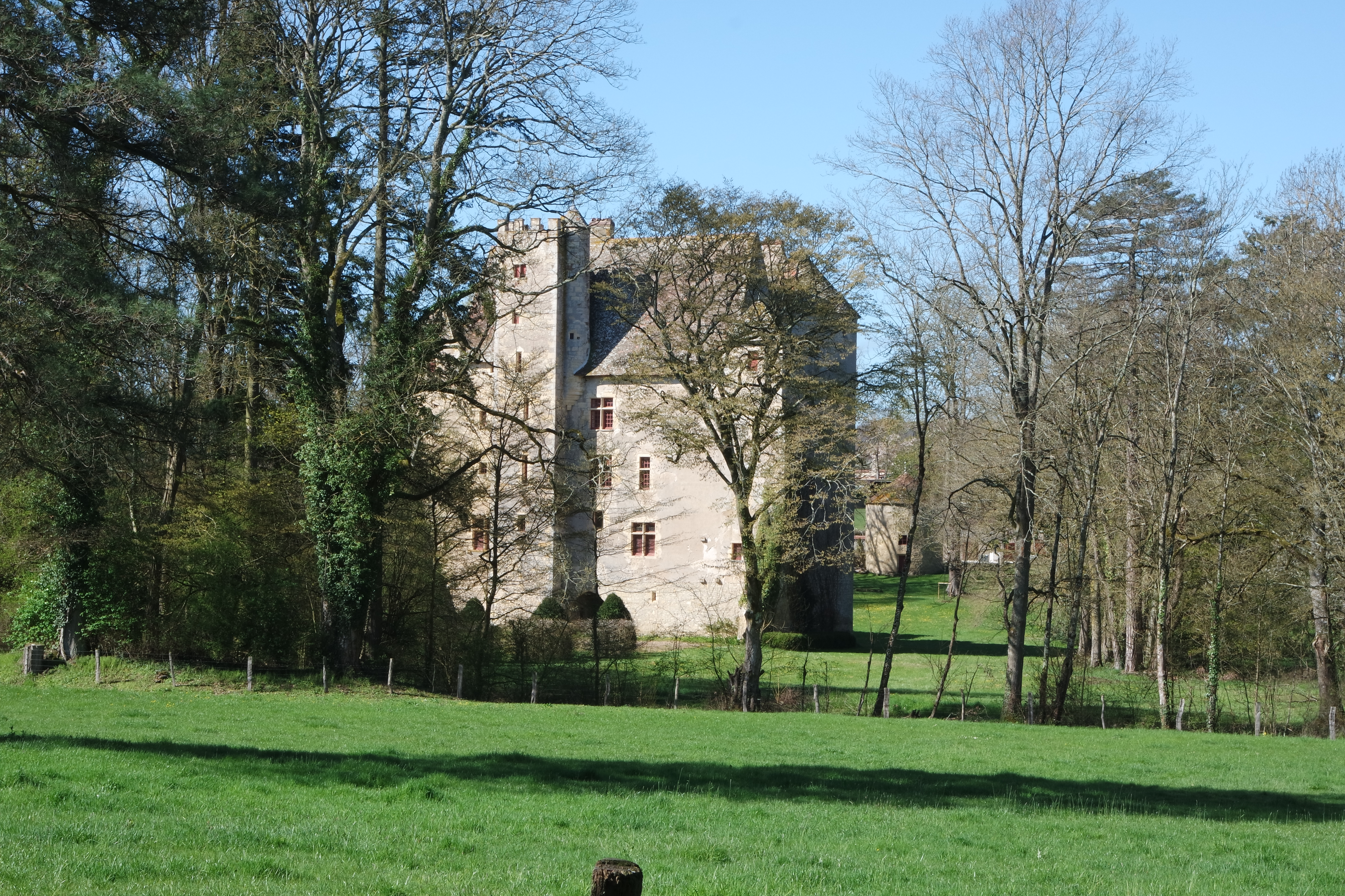 Façade Est du château de Chevenon, Nièvre, France.